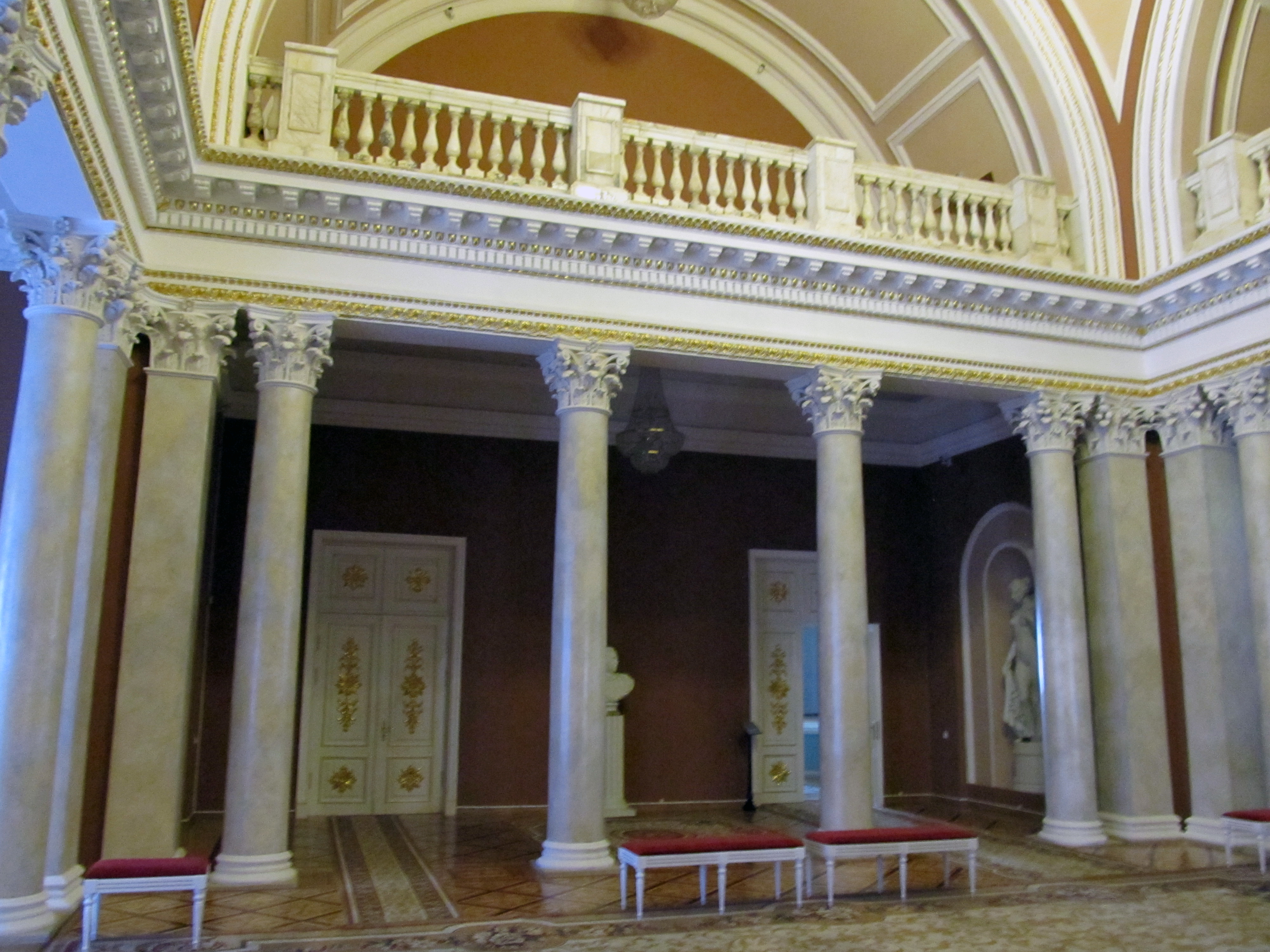 Беларуская (тарашкевіца): Палацава-паркавы ансамбаль: палац, дэкаратыўнае аздабленьне інтэр’ера вежы і цэнтральнай залі палаца, Петрапаўлаўскі сабор, капліца-пахавальня,парк. г. Гомель This is a photo of Belarusian heritage monument. Reference number: 310Г000044 ( WLM)